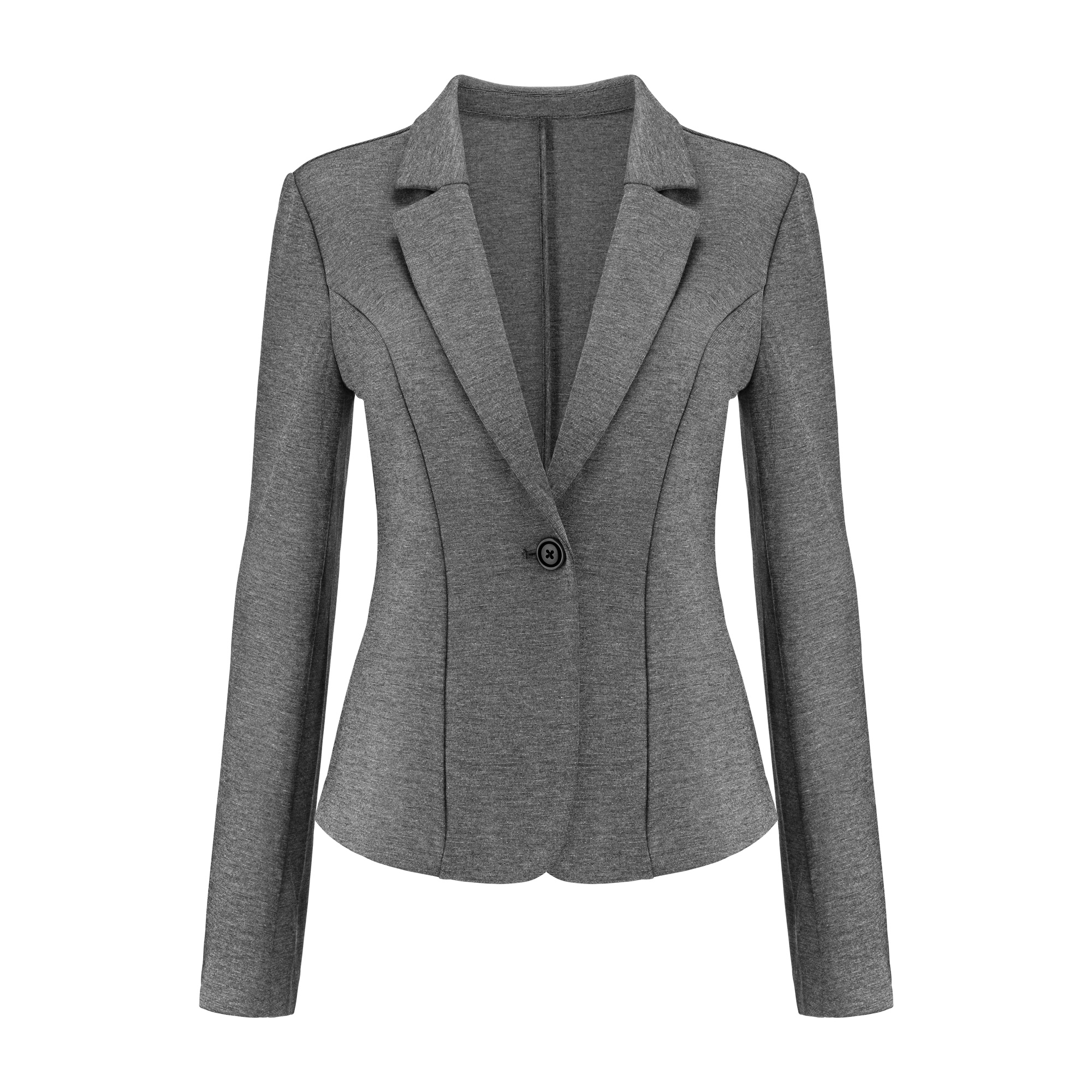 Packshot odzieży typu duch. Ujęcie frontalne.